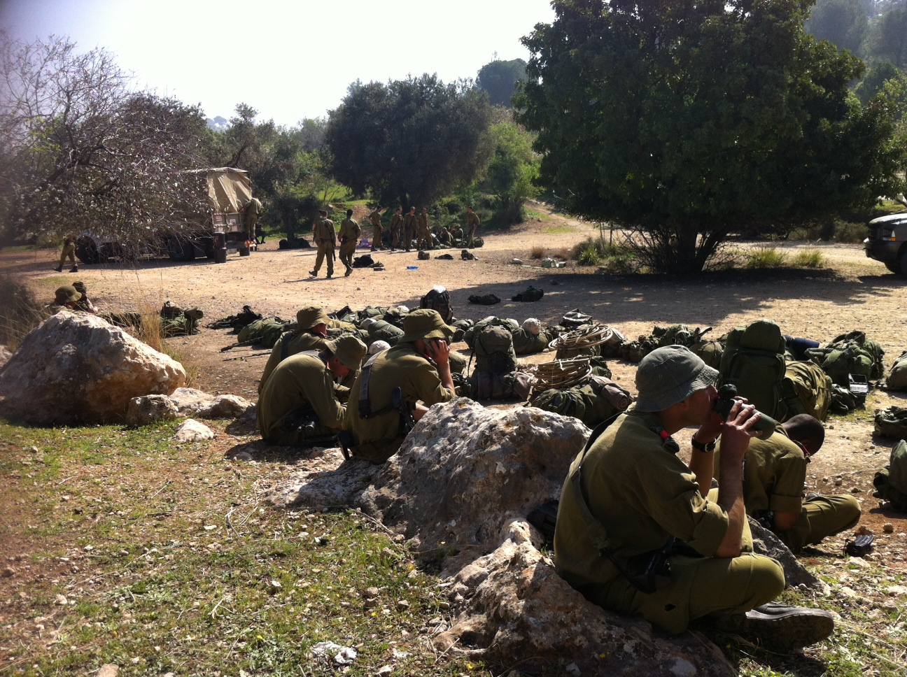 חיילים של חיל האיסוף הקרבי אחרי מסע סוף מסלול בפארק